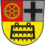 Wappen von Erfurt-Egstedt